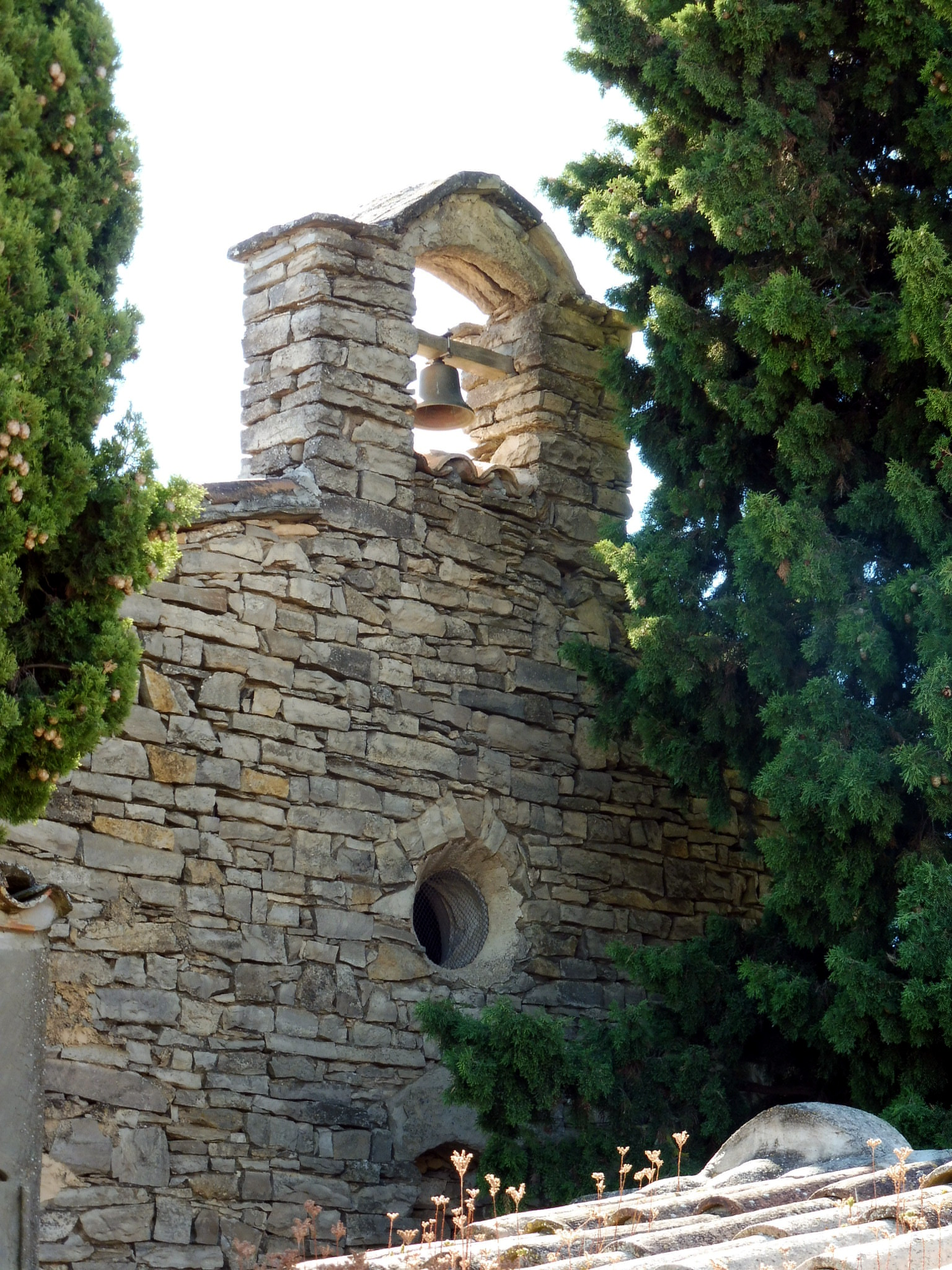 Capella del Cementiri de Vilagrasseta (Montoliu de Segarra): espadanya